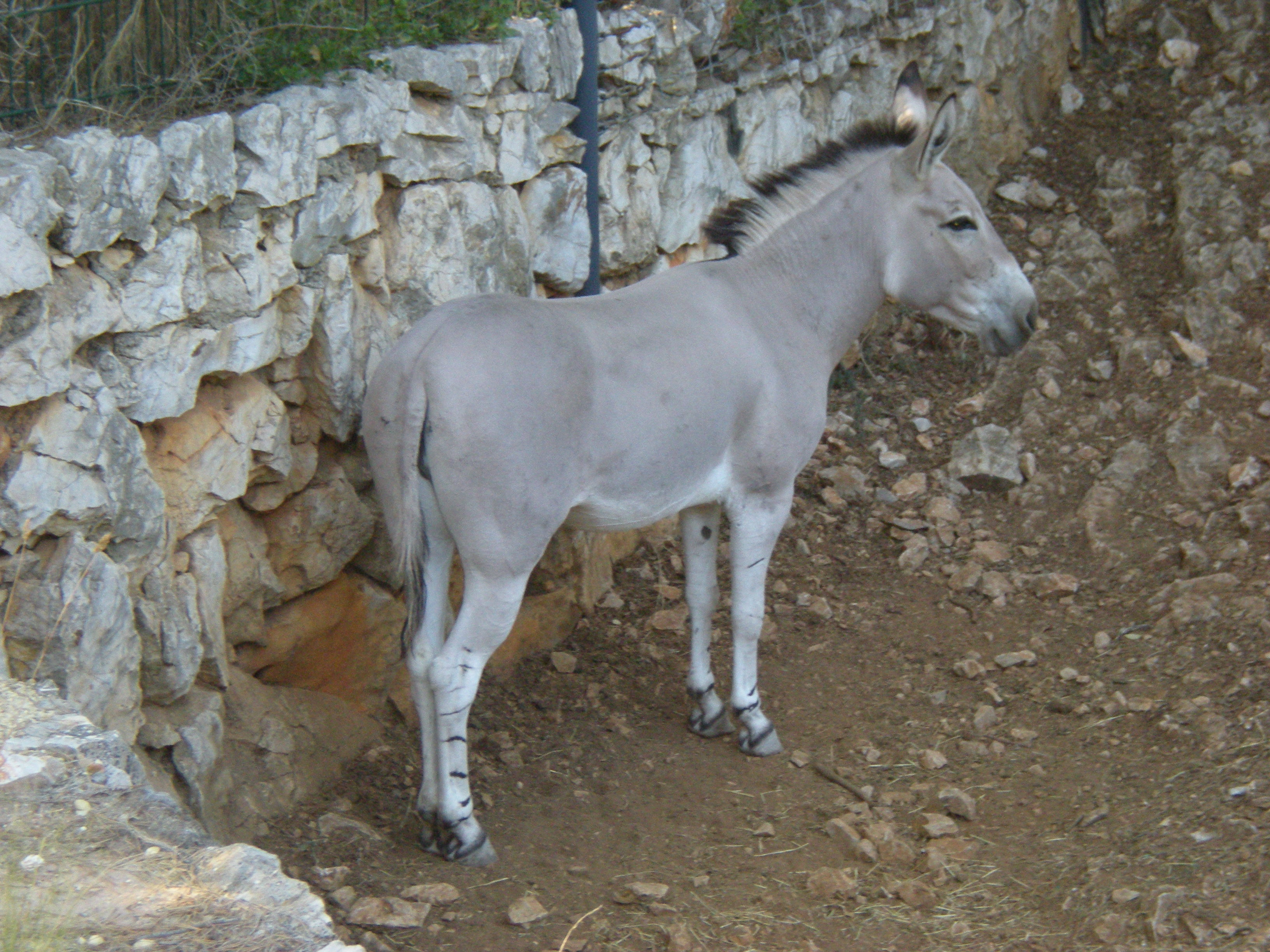 Ane de Somalie.au Zoo de Lunaret.